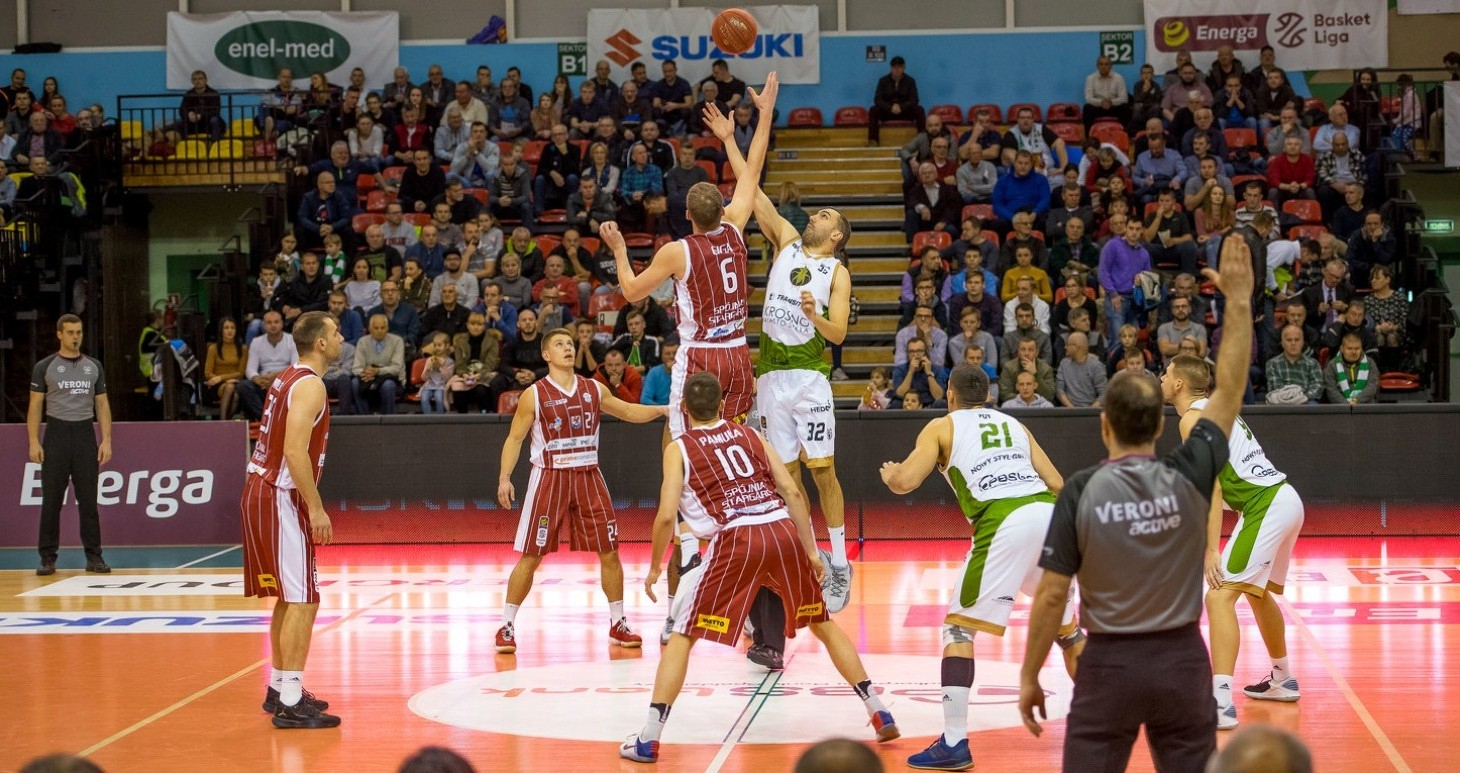 Mecz Krosno - Spójnia (24.11.2018)